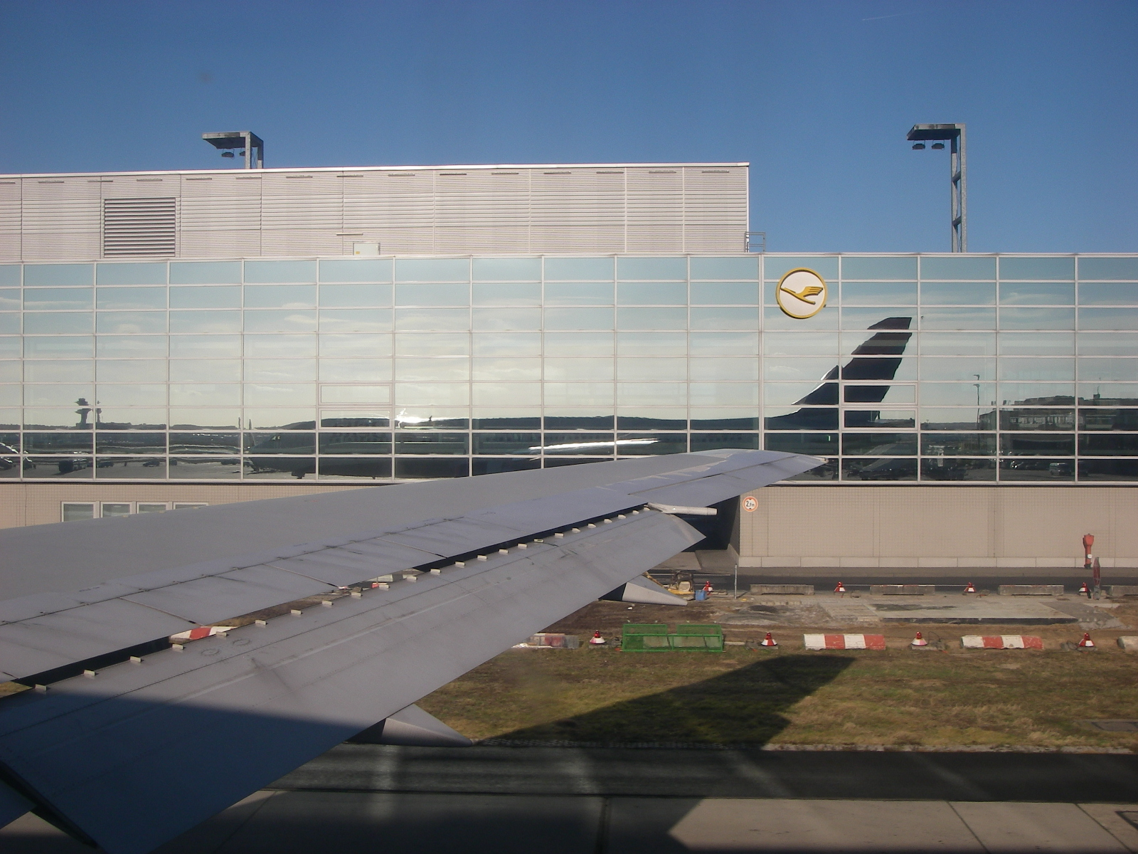 Аэропорт Франкфурта-на-Майне. Терминал Lufthansa.